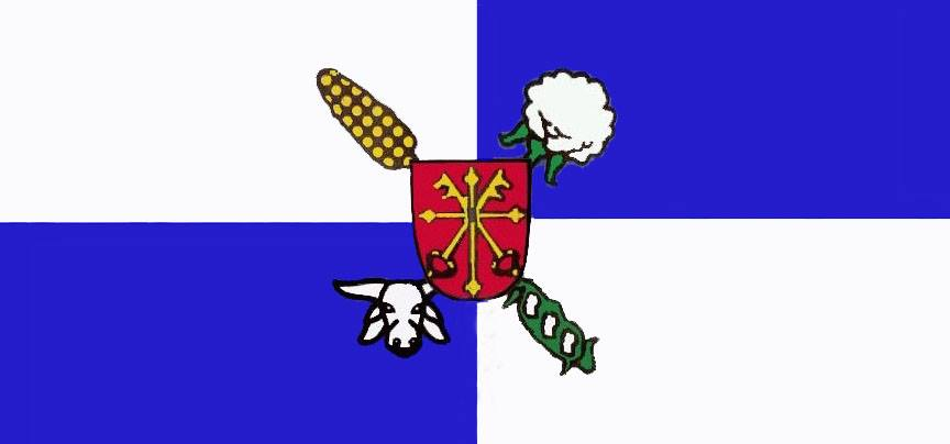 Ingles